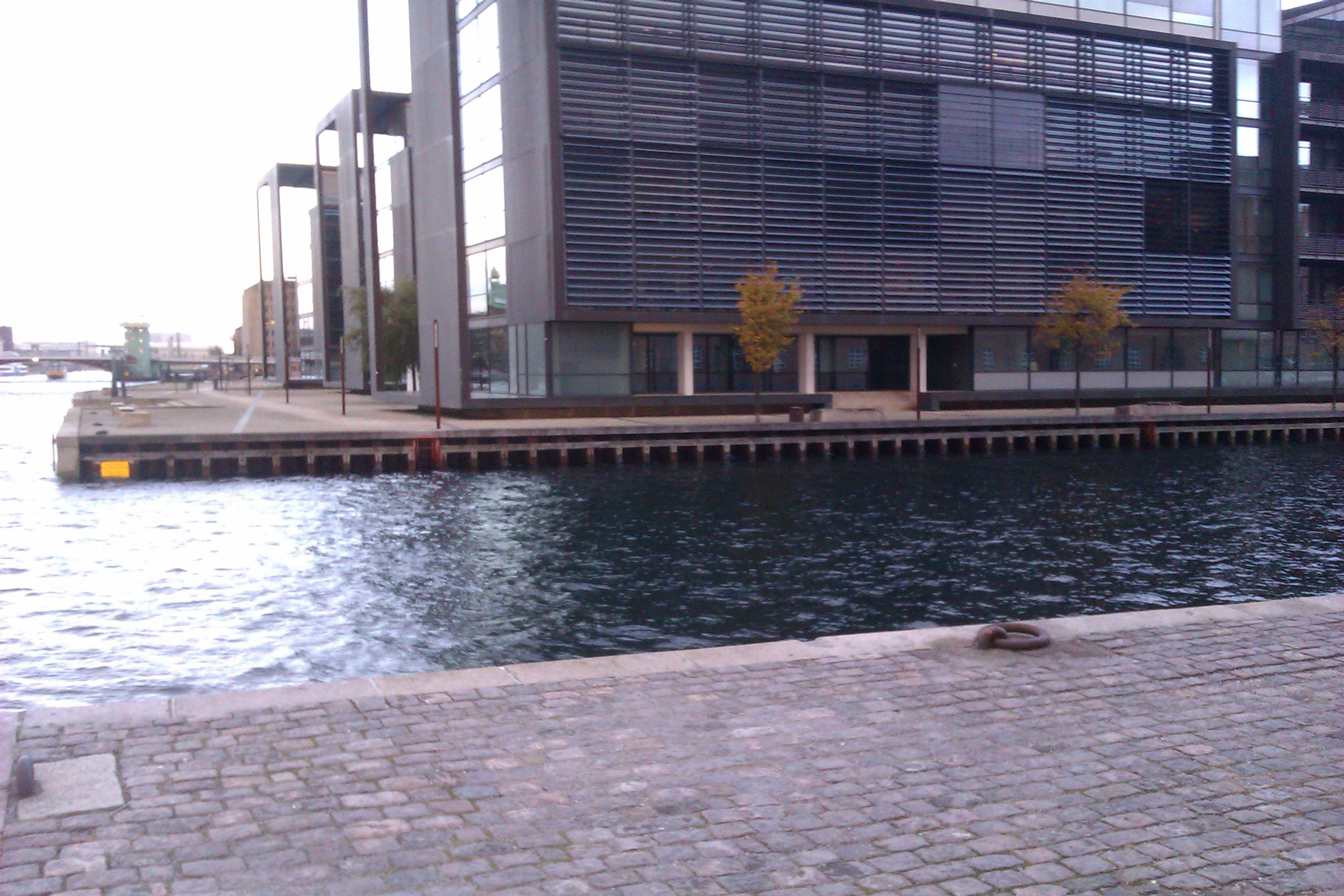 Stedet hvor Cirkelbroen kommer til være